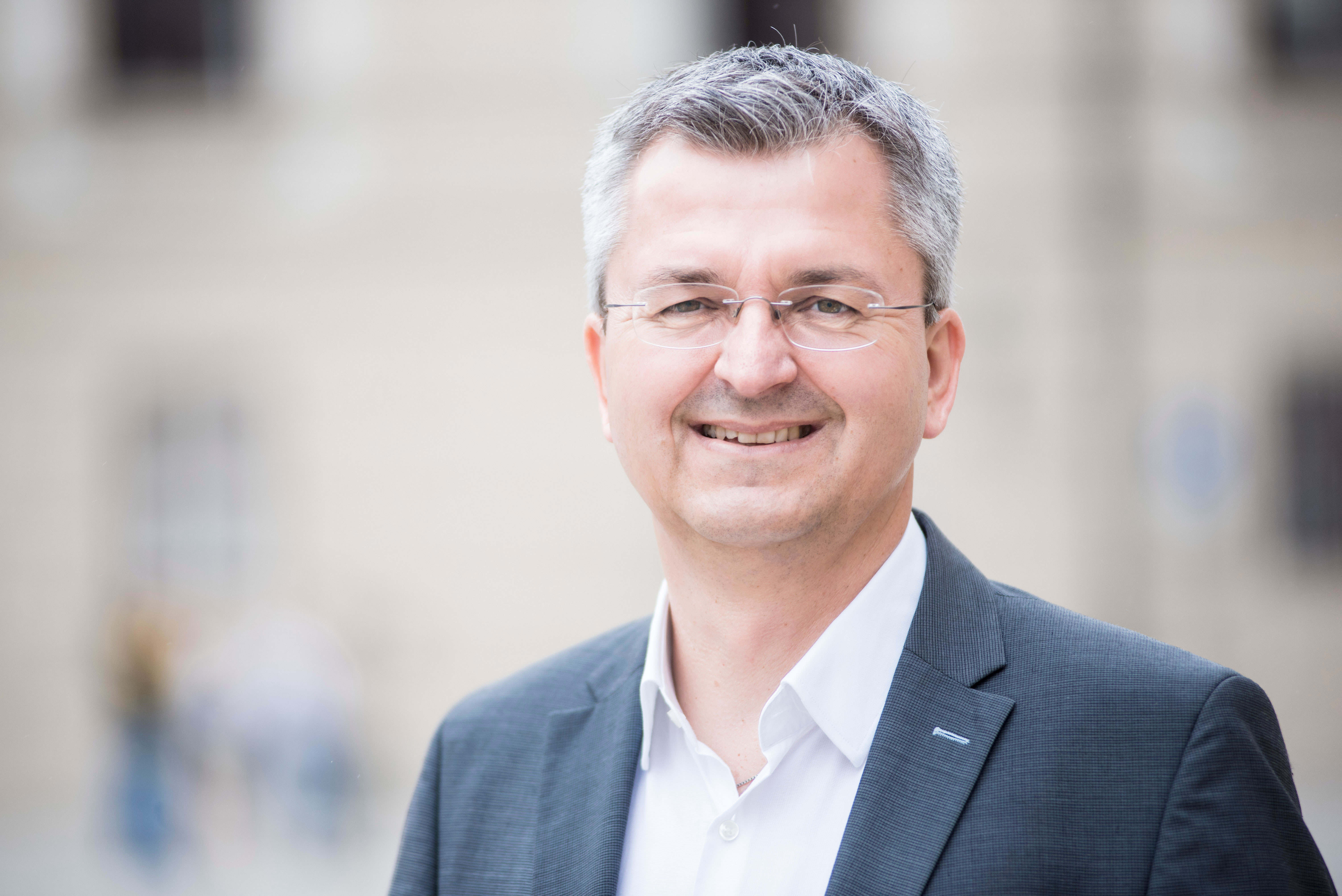 Josef Missethon im März 2015